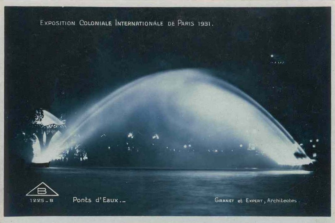 La fontaine monumentale "Le Pont d'Eau" à l'Exposition Coloniale de Paris en 1931